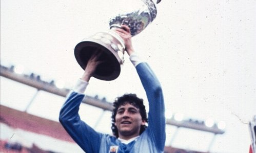 José Perdomo levantando la Copa America 1987 en Agentina